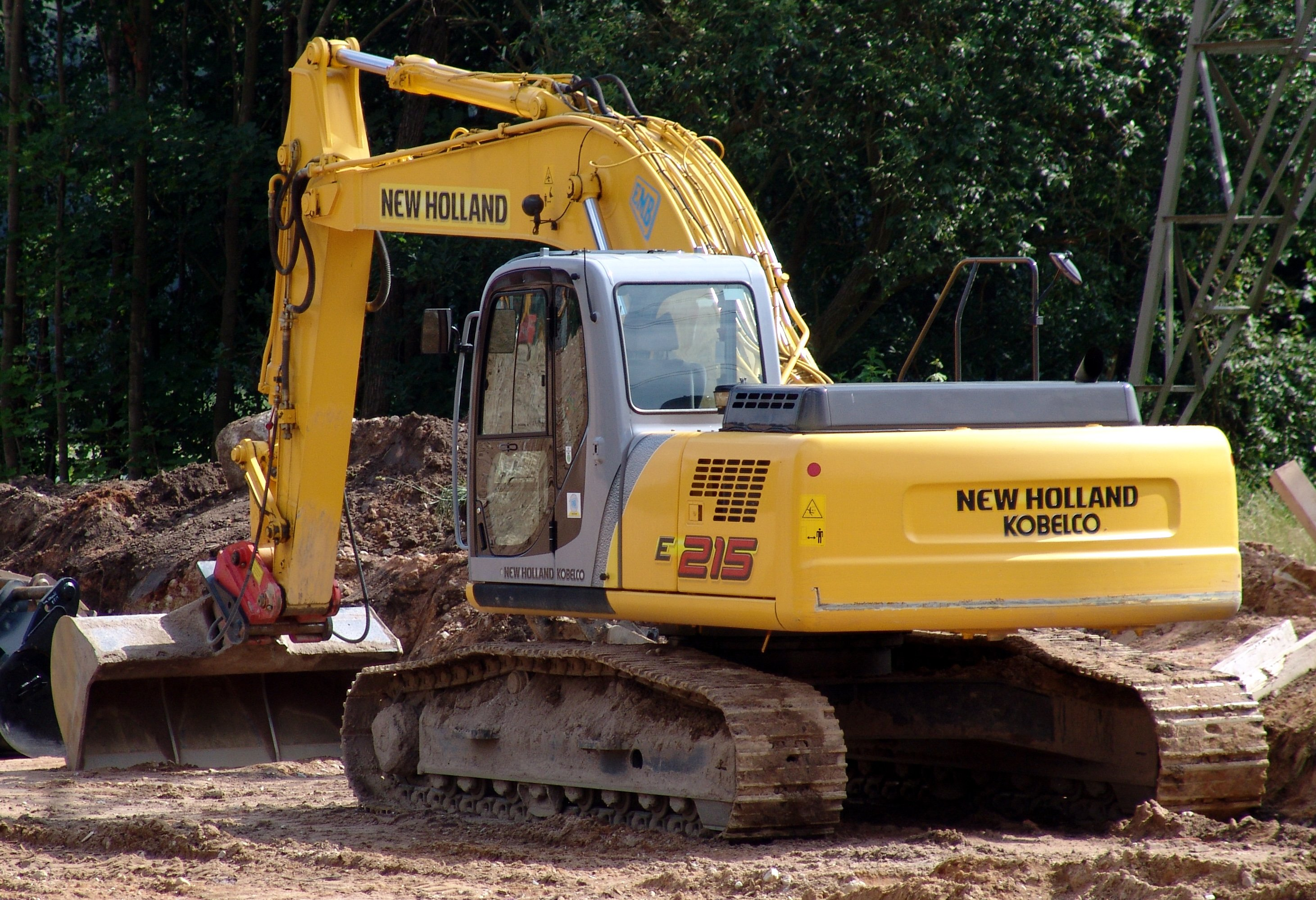 NEW HOLLAND 215 Raupenbagger